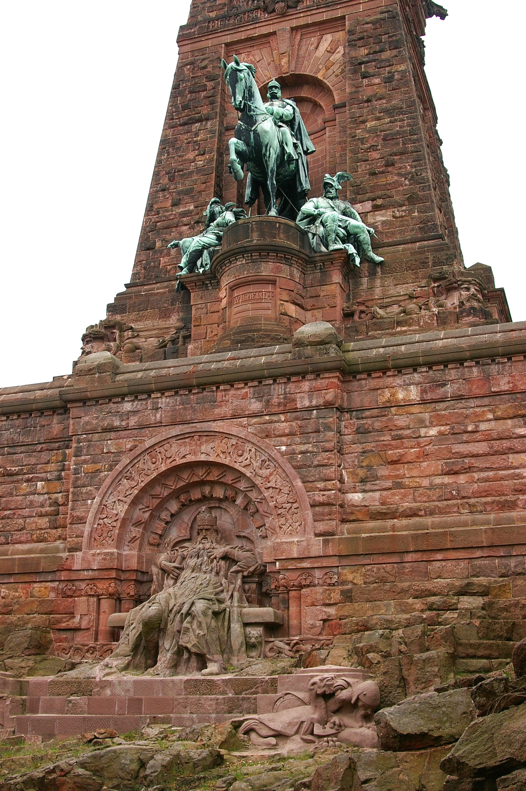 Kyffhäuser-Denkmal - Barbarossa in Stein, darüber Wilhelm I